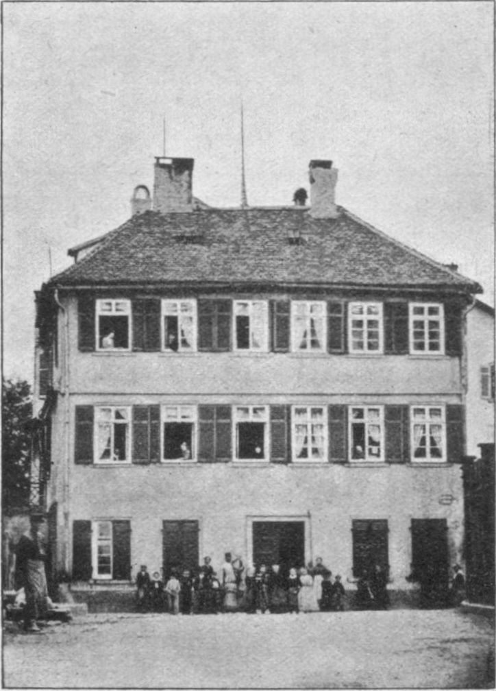 Hartmannsches Haus am Bollwerk in Stuttgart, an der Ecke Fritz-Elsas-Straße 49 / Ecke Leuschnerstraße, vor 1874. Wohnhaus von Johann Georg Hartmann (1731–1811), Vater von August von Hartmann, Großvater von Emilie Reinbeck. Es musste 1874 dem Bau neuer städtischer Schulgebäude weichen.